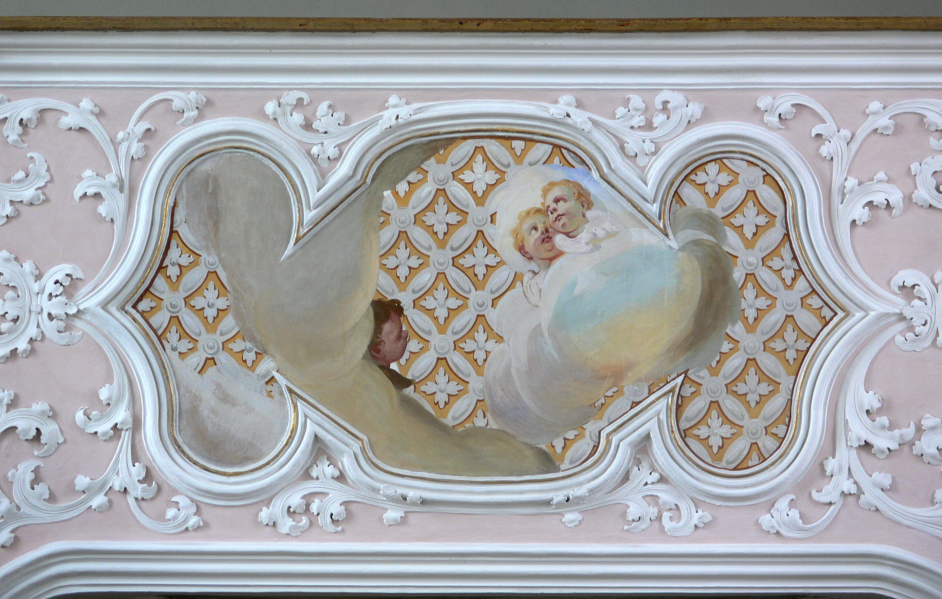 Pfarrkirche St. Peter und Paul, Benningen, Landkreis Unterallgäu Empore: Putten